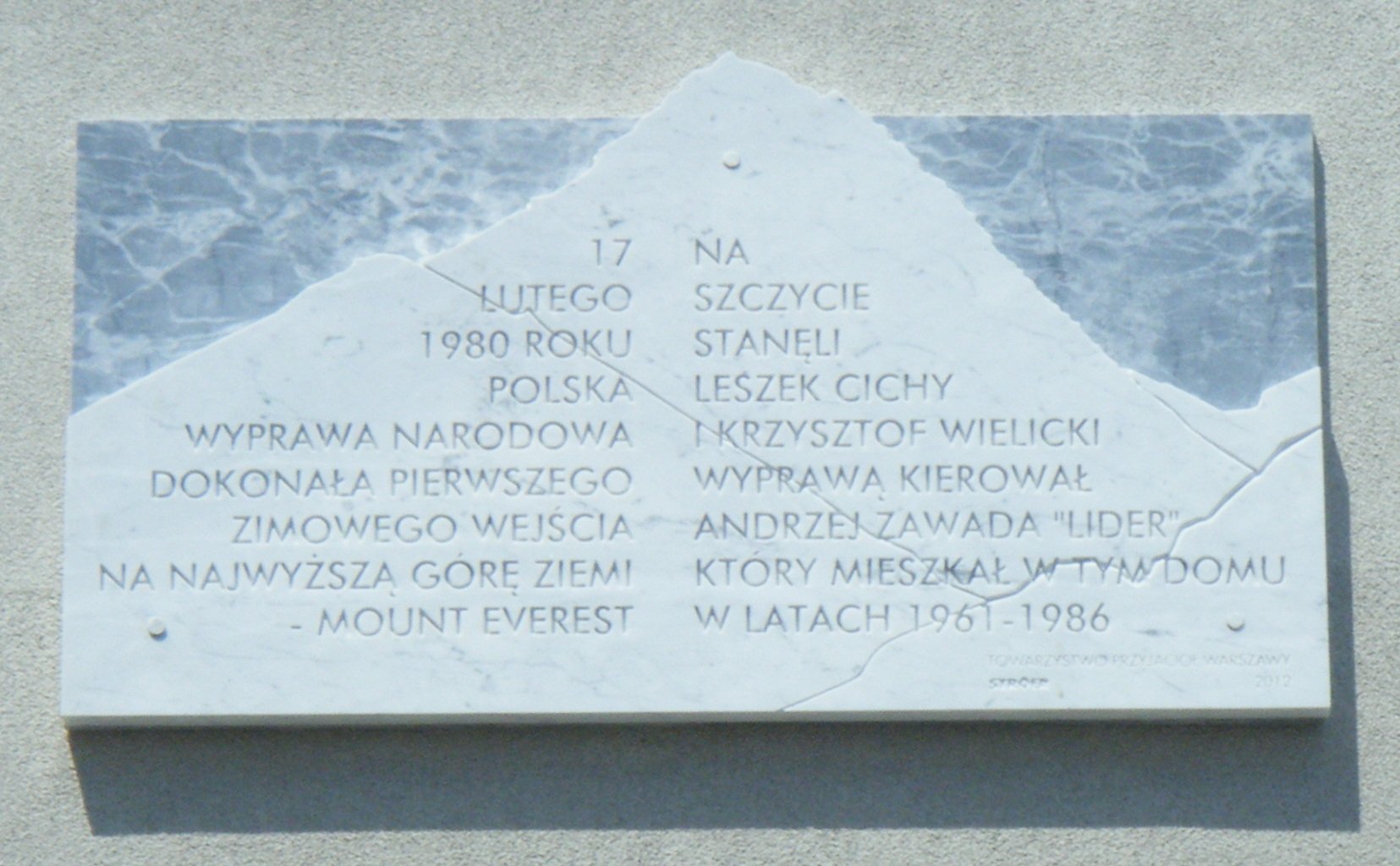 Tablica upamiętniająca zimową wyprawę na Mount Everest. Warszawa, Saska Kępa, ul. Francuska 49.